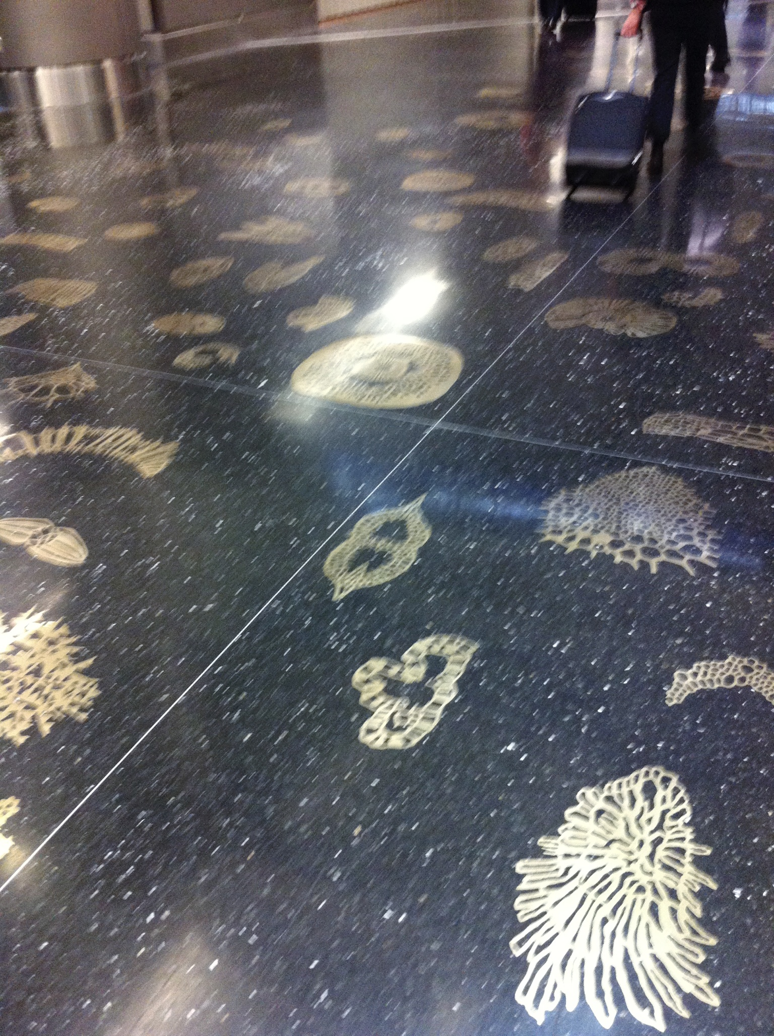 Piso de la Sala D del aeropuerto de Miami